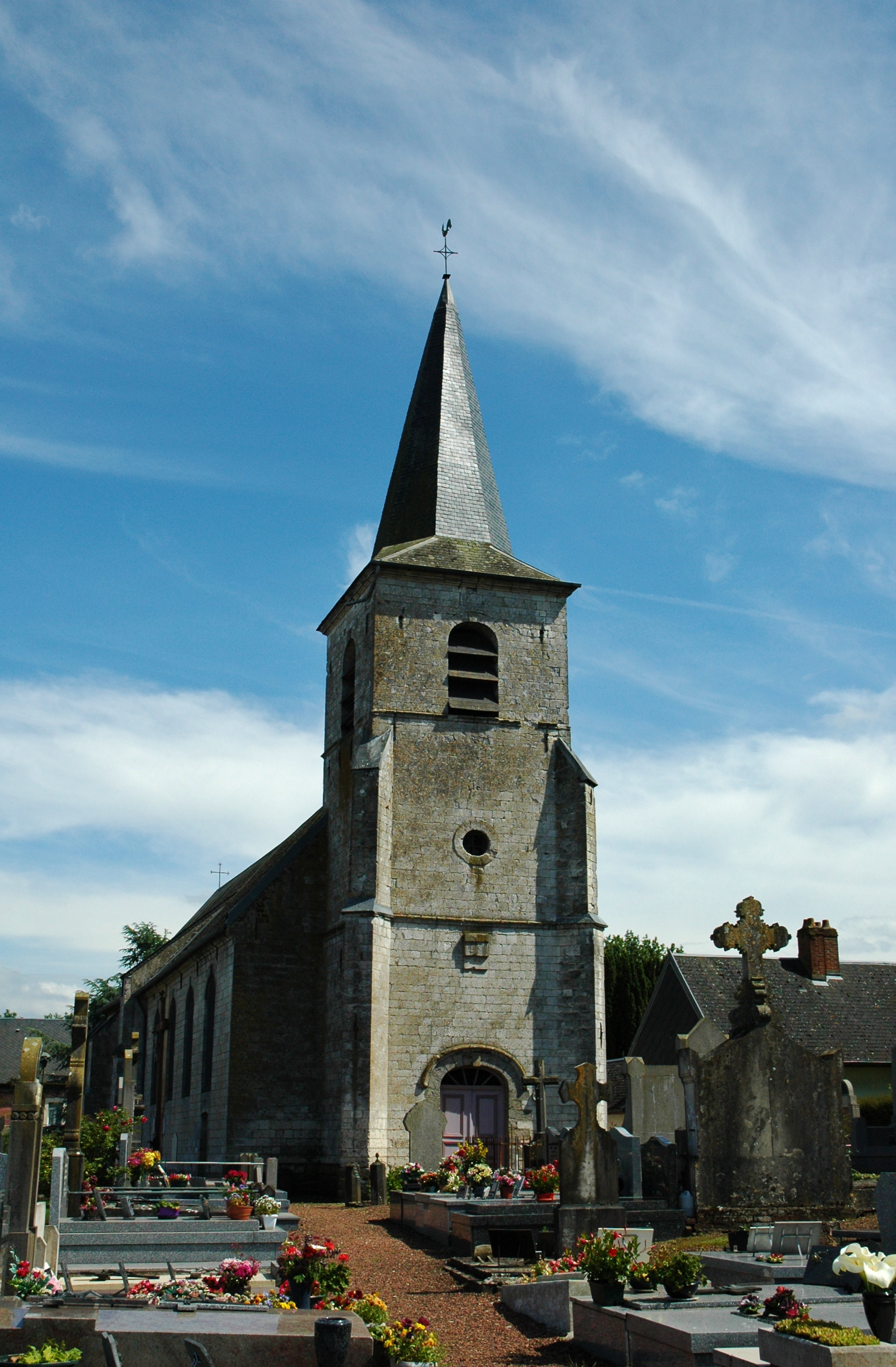 Eglise Saint Léger, XVI siècle